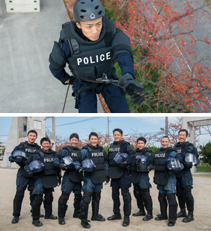 福岡県警察第二機動隊 レンジャー部隊